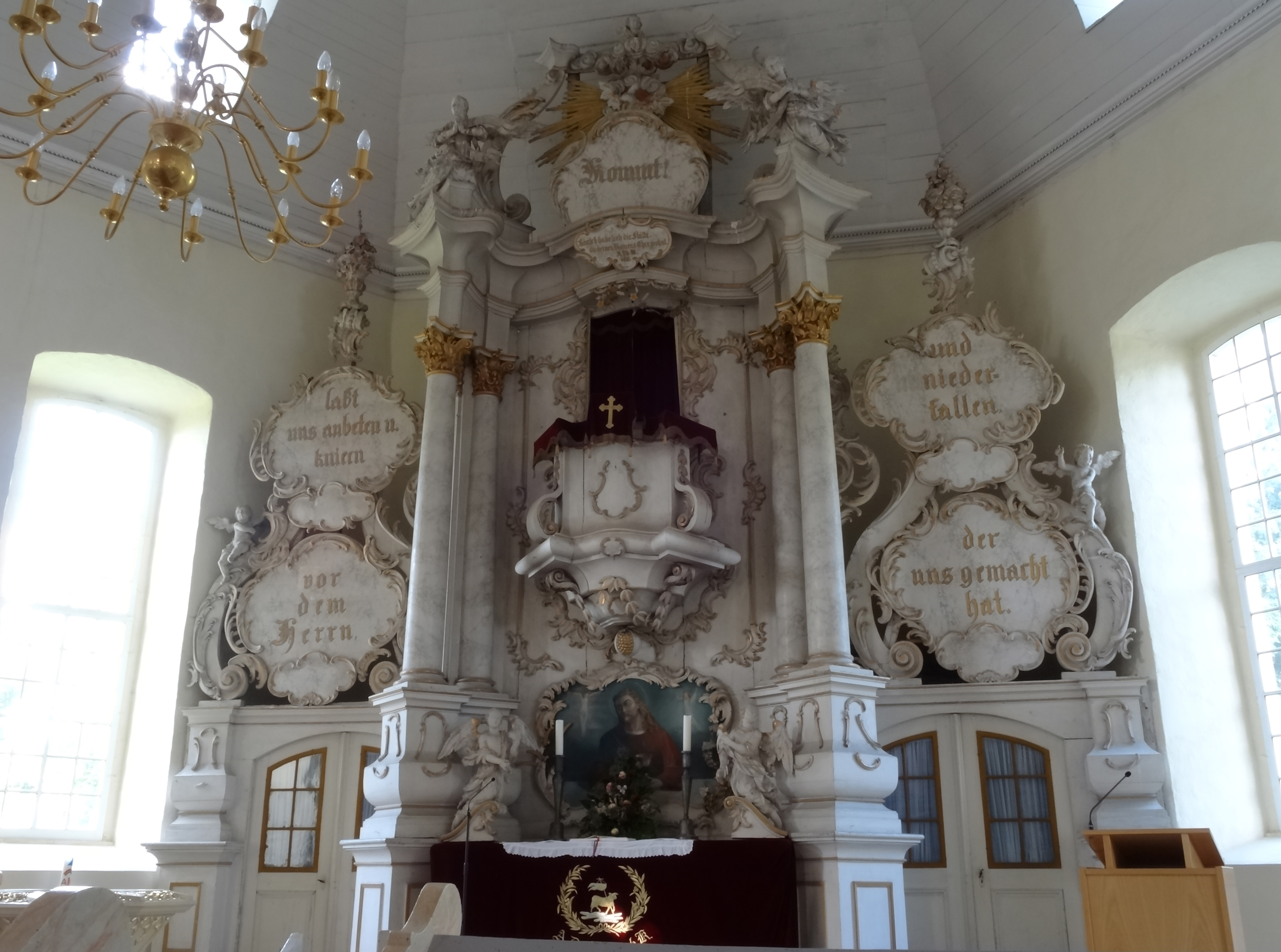 um 1770 entstandener Kanzelaltar der Büßlebener St. Petri-Kirche